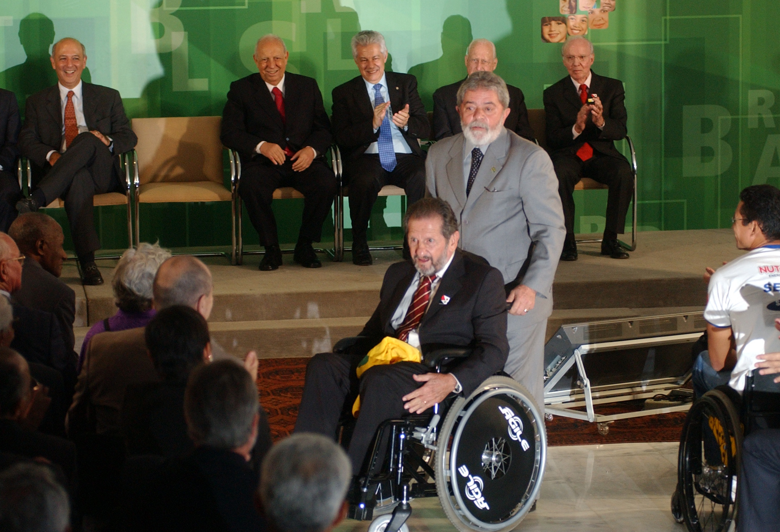 Presidente Lula e o ex-jogador de futebol Newton De Sordi durante comemorações aos 50 anos do primeiro título da Copa do Mundo conquistado pelo Brasil em 1958, no Palácio do Planalto